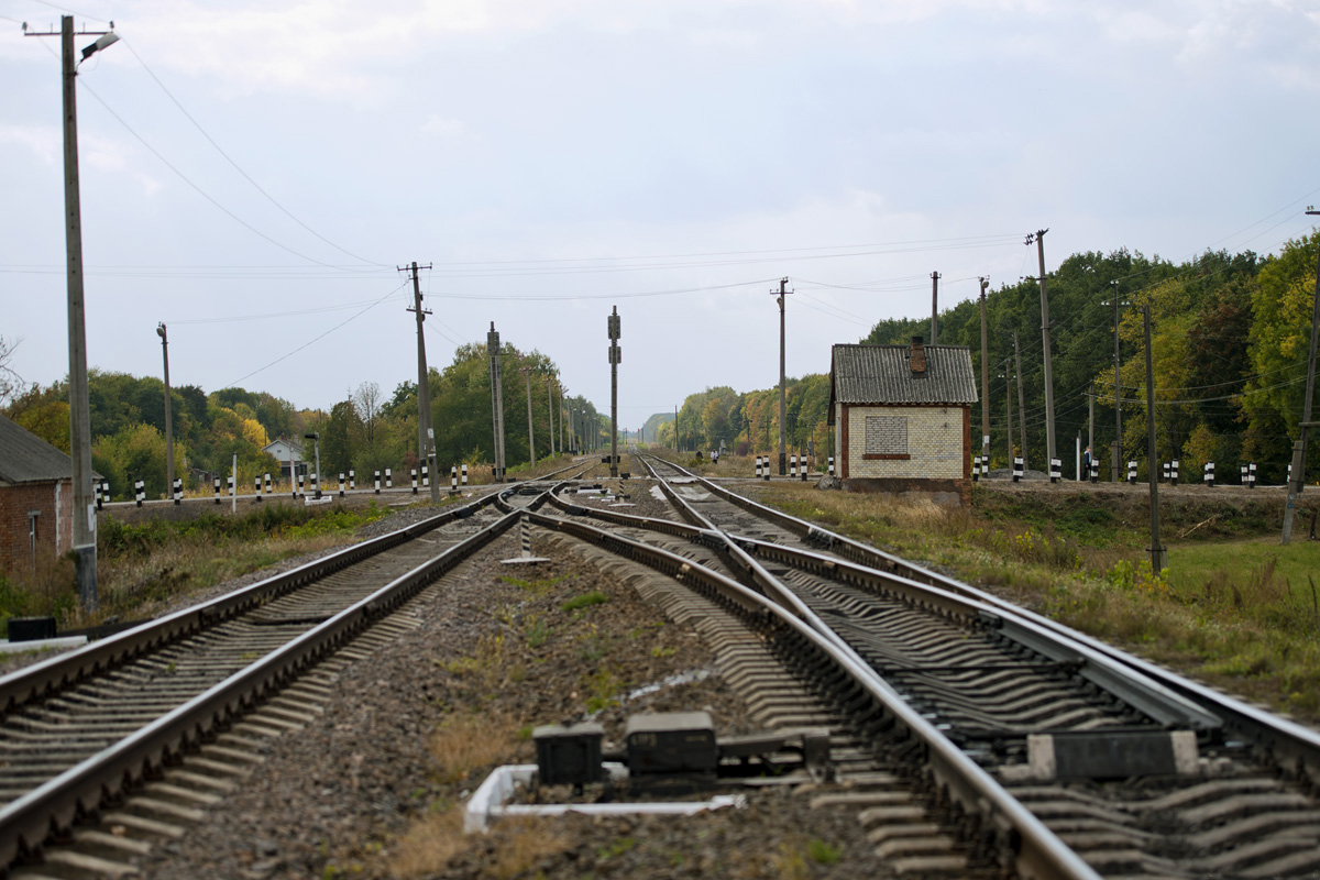 Роз'їзд Воронківці